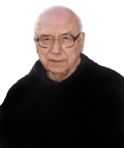 Celestin Tomić, franjevac konventualac